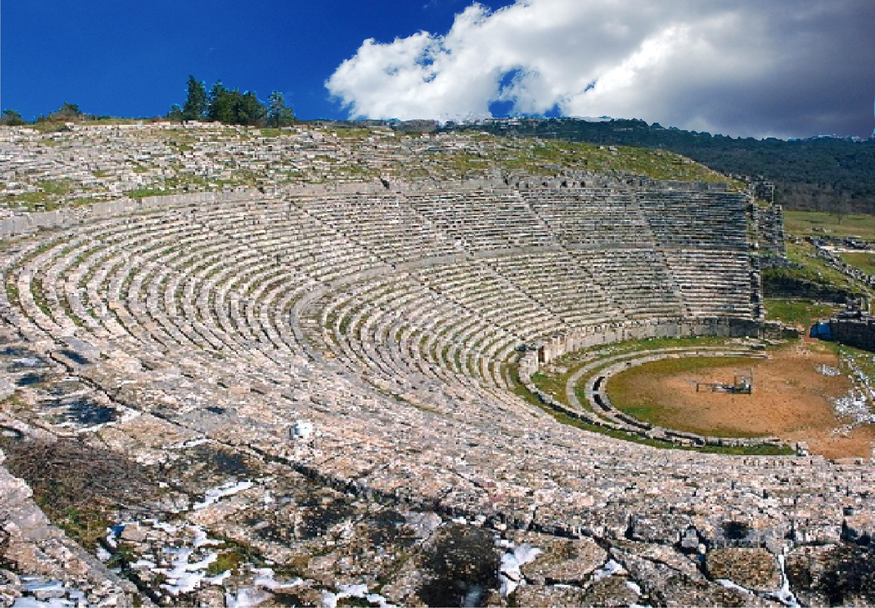 Αρχαίο Θέατρο Δωδώνης, 2005